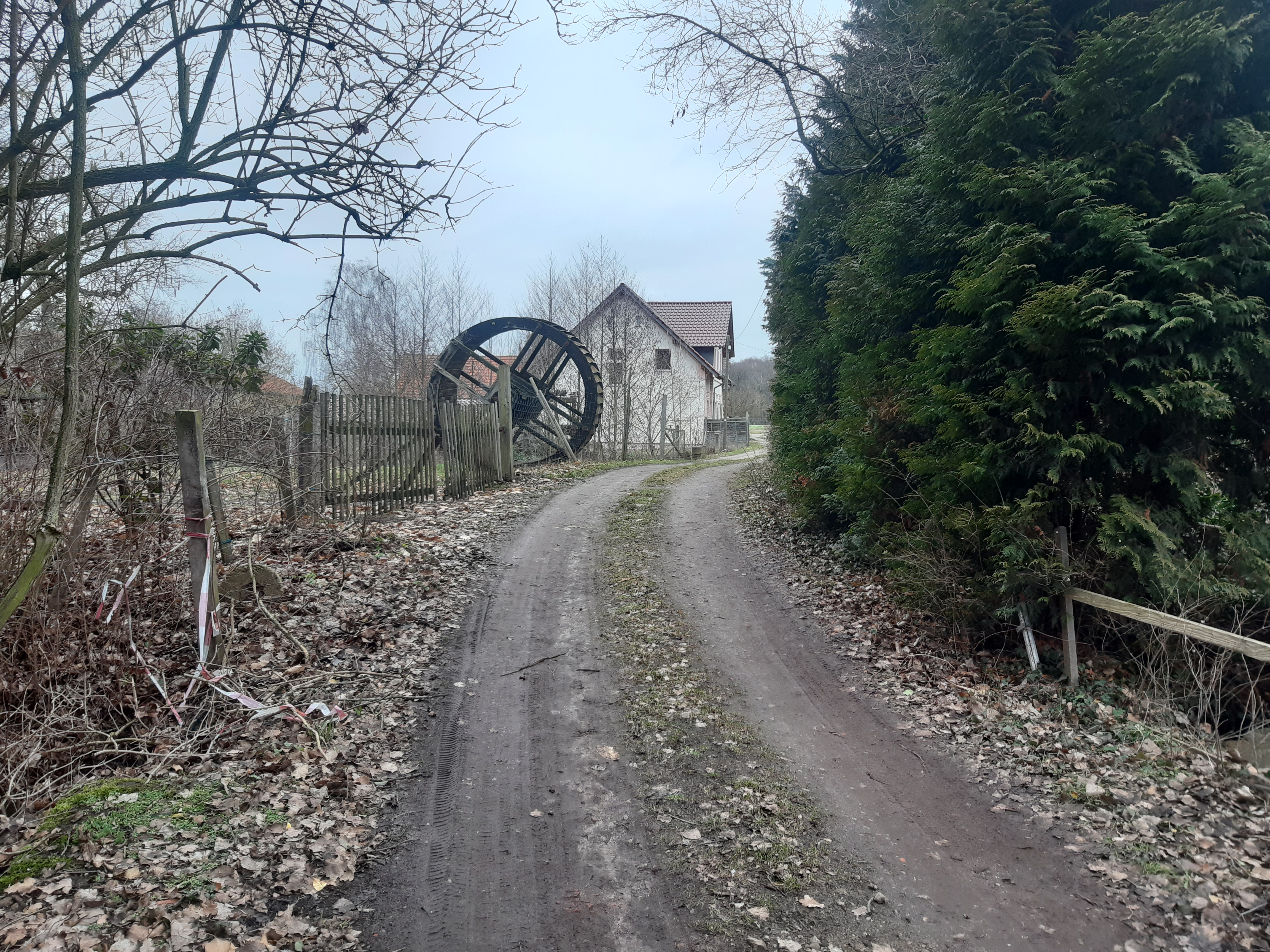 Mühlenrad